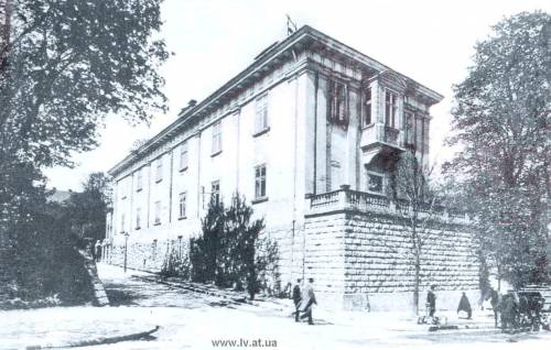 Арсенал_сенявських_1916.jpg: Львів, арсенал Сенявських